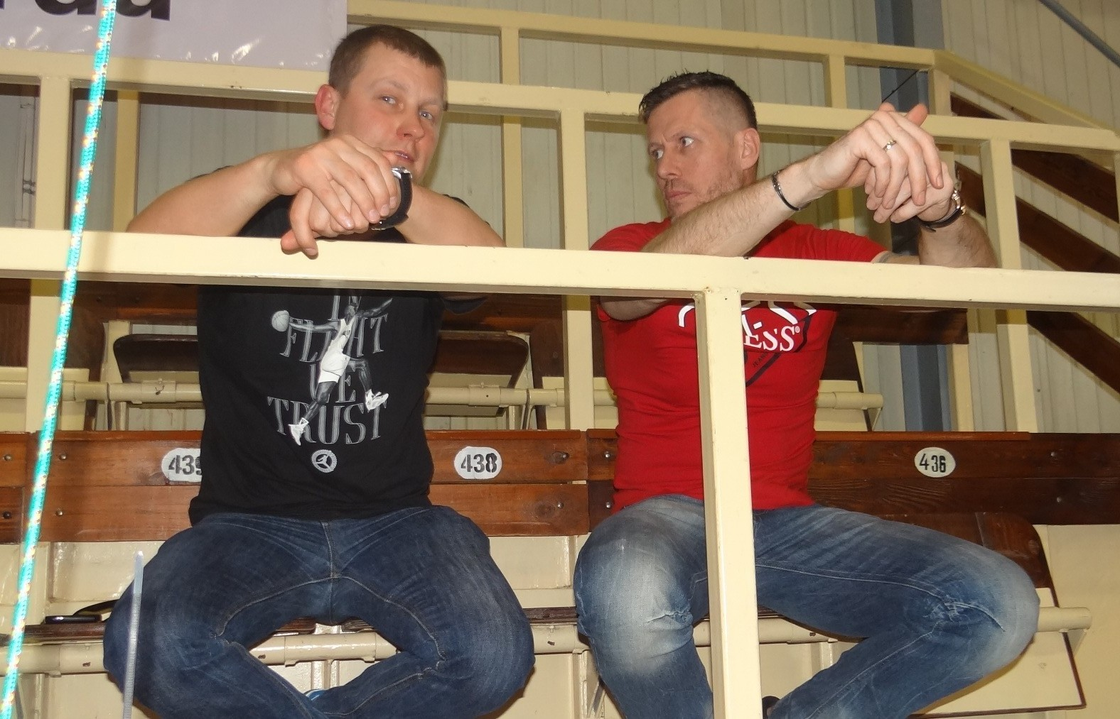 Wychowanek Spójni Stargard Ignatowicz (P) 29.04.2018